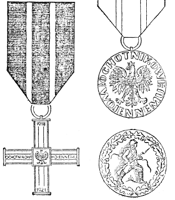 Krzyż i Medal Ochotniczy za Wojnę (awers i rewers)